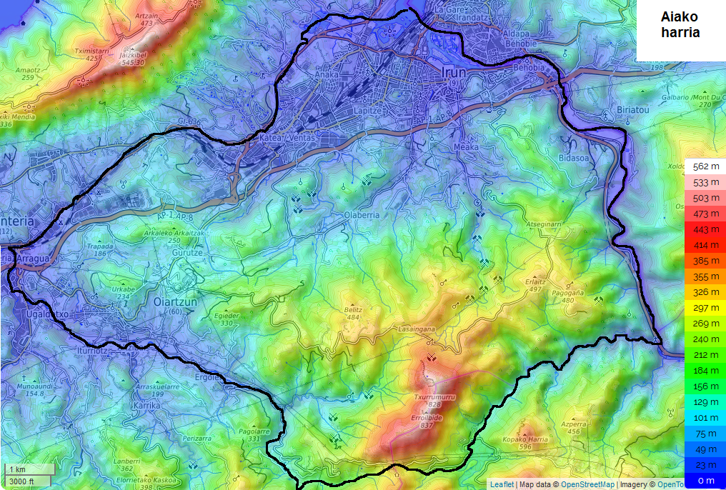 Aiako harria